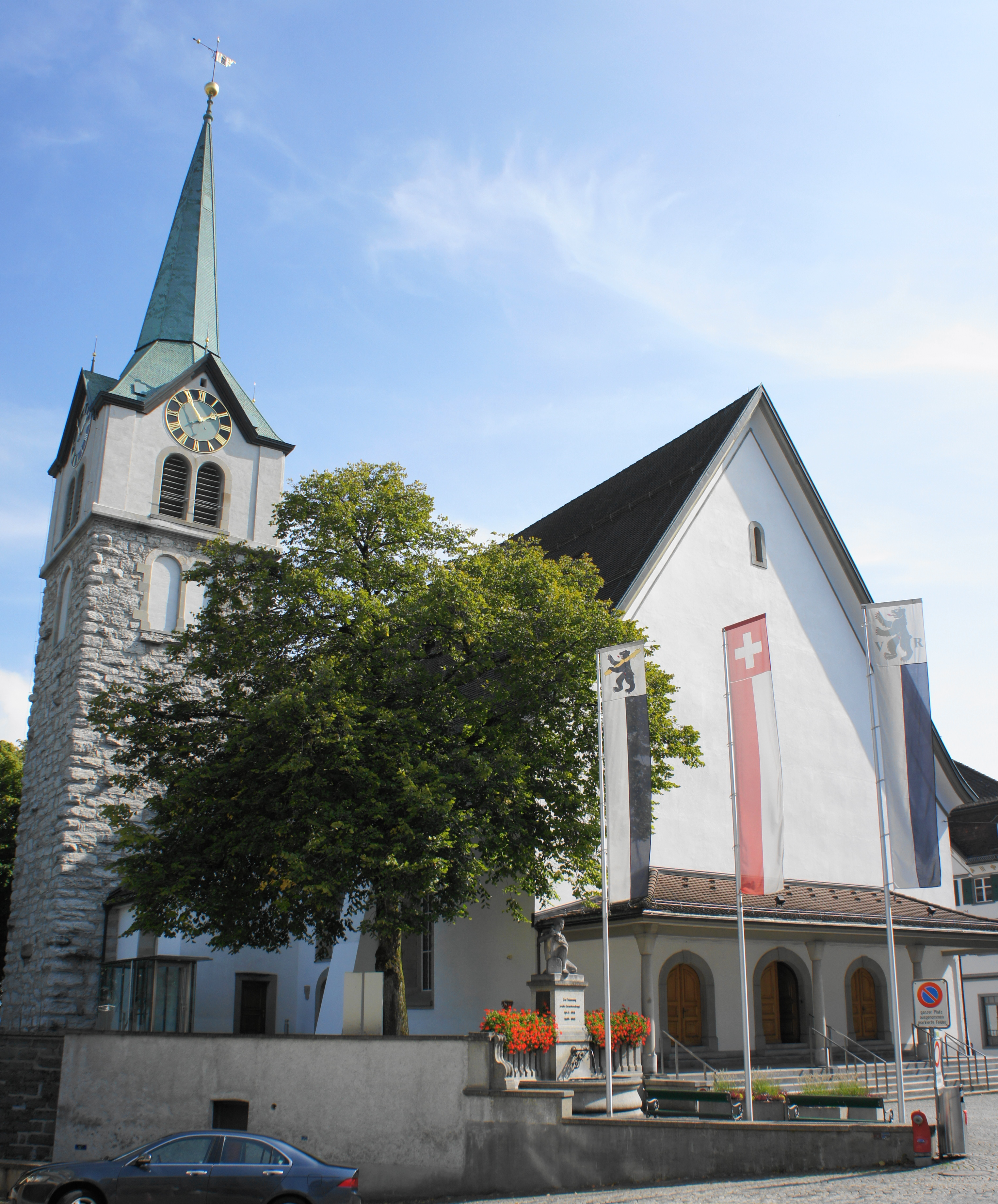 Reformierte Kirche in Herisau, Blick auf die West- und Nord-Fassade